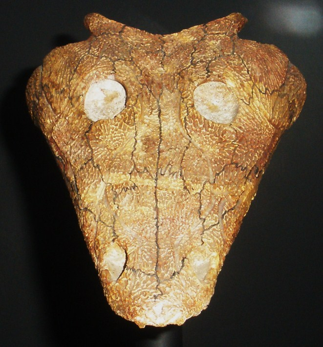 Fossil of Benthosuchus, an extinct amphibian-- Took the photo at Natural History Museum, London